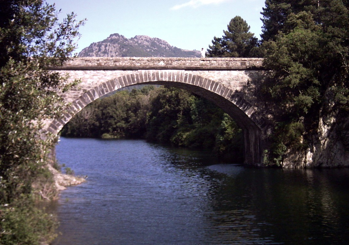 Le pont de Sampolo sur le Fiumorbo, dans la partie basse de la commune de Ghisoni, Haute-Corse.